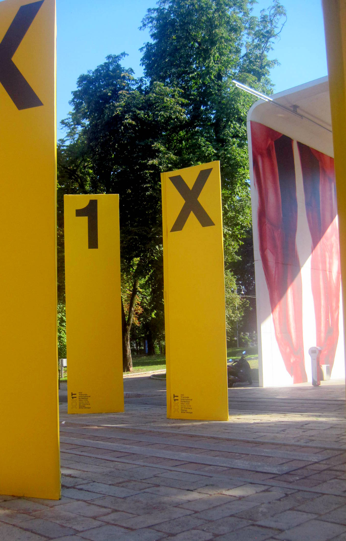 Palazzo dell'Arte This is a photo of a monument which is part of cultural heritage of Italy.